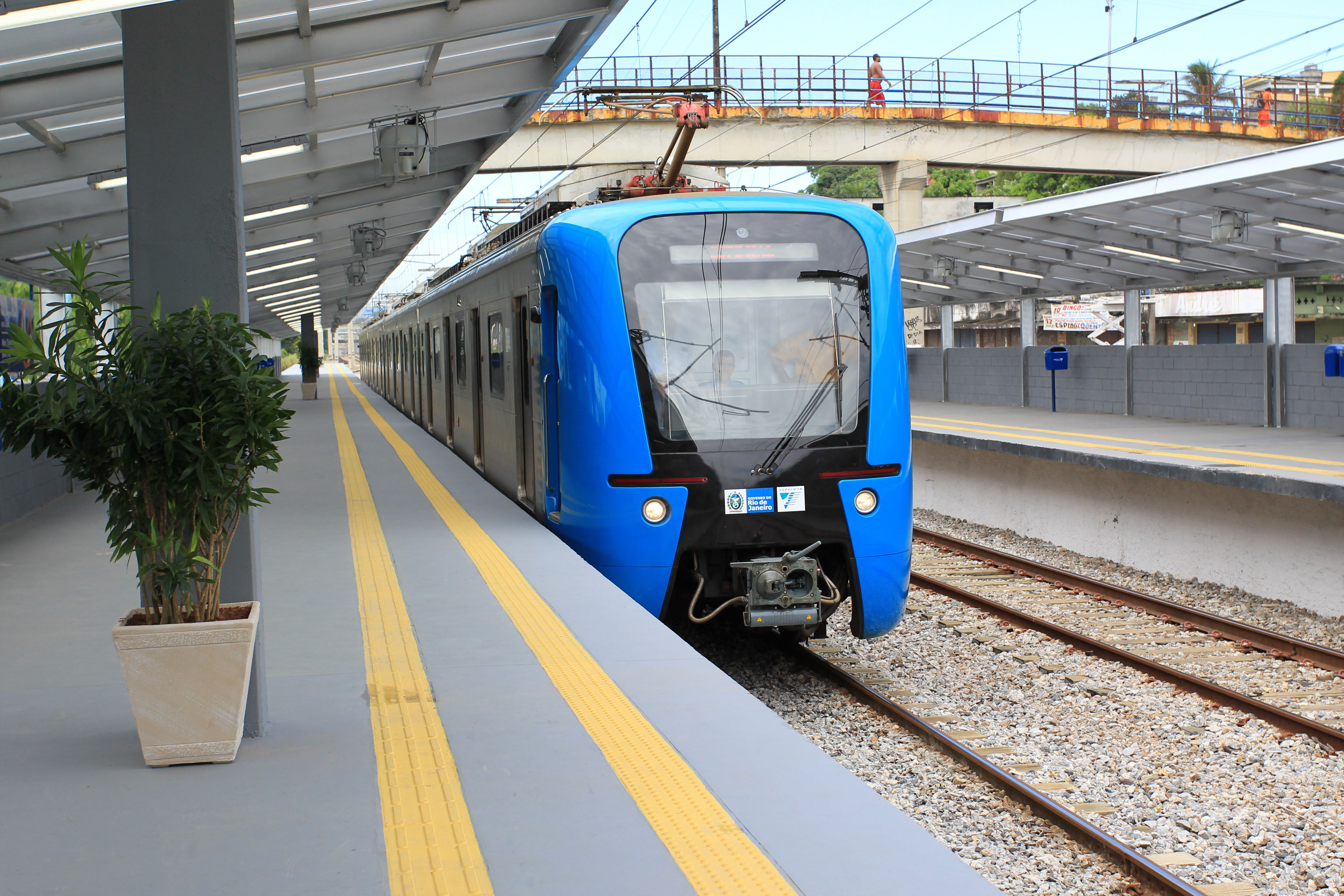 Estação Corte 8 com o trem serie 3000 na sua plataforma.